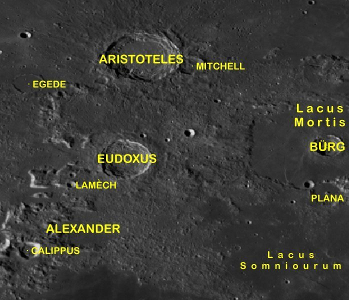 Cráter lunar Eudoxus. Localización. (Imagen LROC)